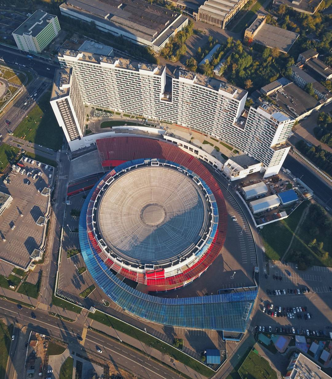 вид сверху